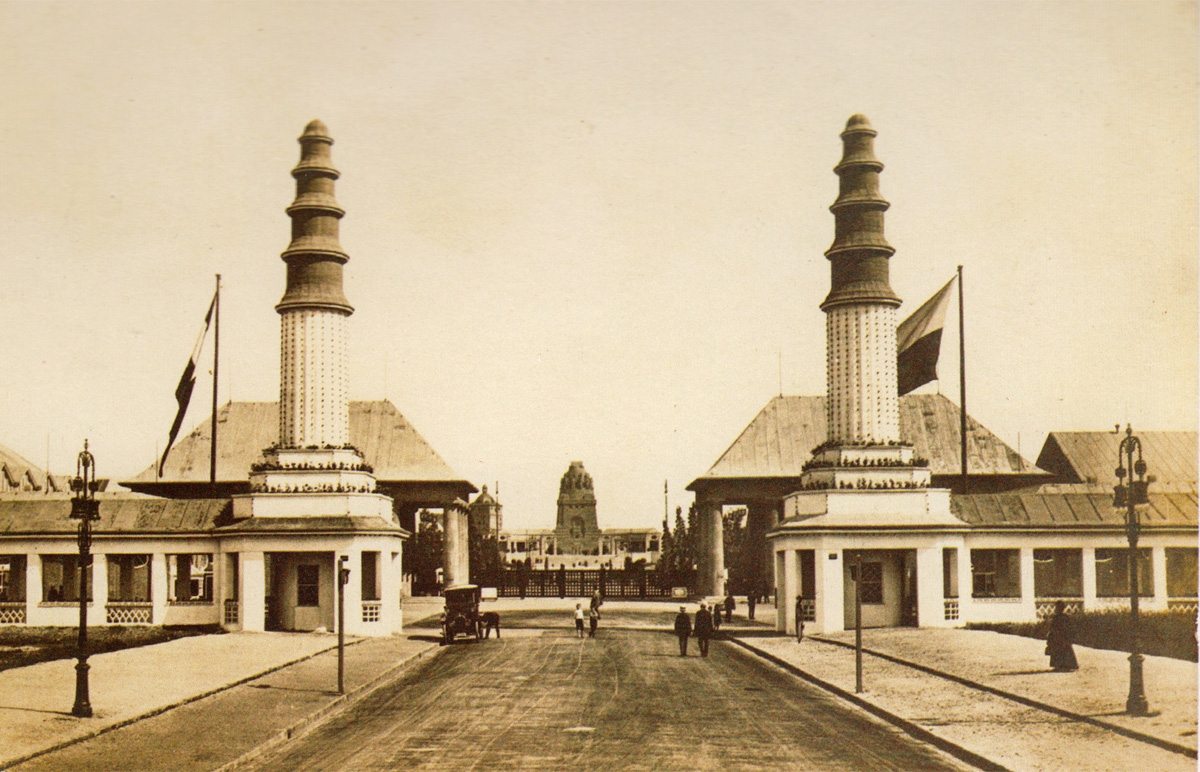 Eingang zur Bugra 1914 in Leipzig im Zuge der Straße des 18. Oktober